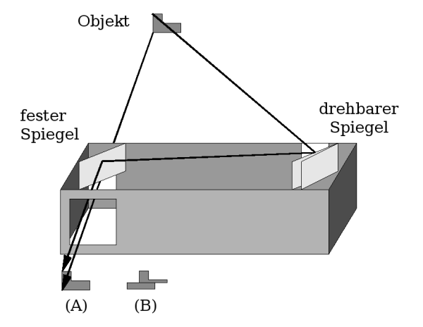 Funktionsschema eines Schnittbildentfernungsmessers. Der drehbare Spiegel wird solange justiert, bis die oberes Bildhälfte mit der unteren zur Deckung kommt. Aus dem Winkel des drehbaren Spiegel kann auf die Entferung des Objektes geschlossen werden.